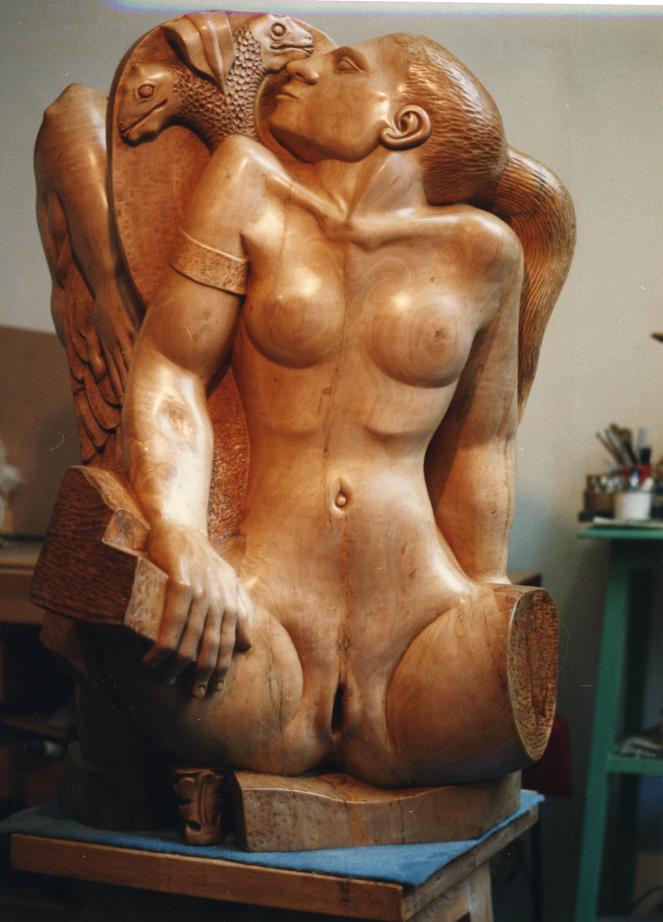 Triade, scultura in legno d'ulivo